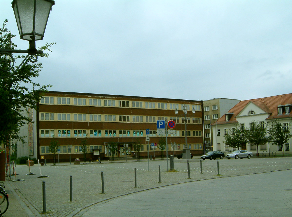 Ehemaliges Arbeiterwohnheim (AWH) an der Marktplatz Südseite in Spremberg